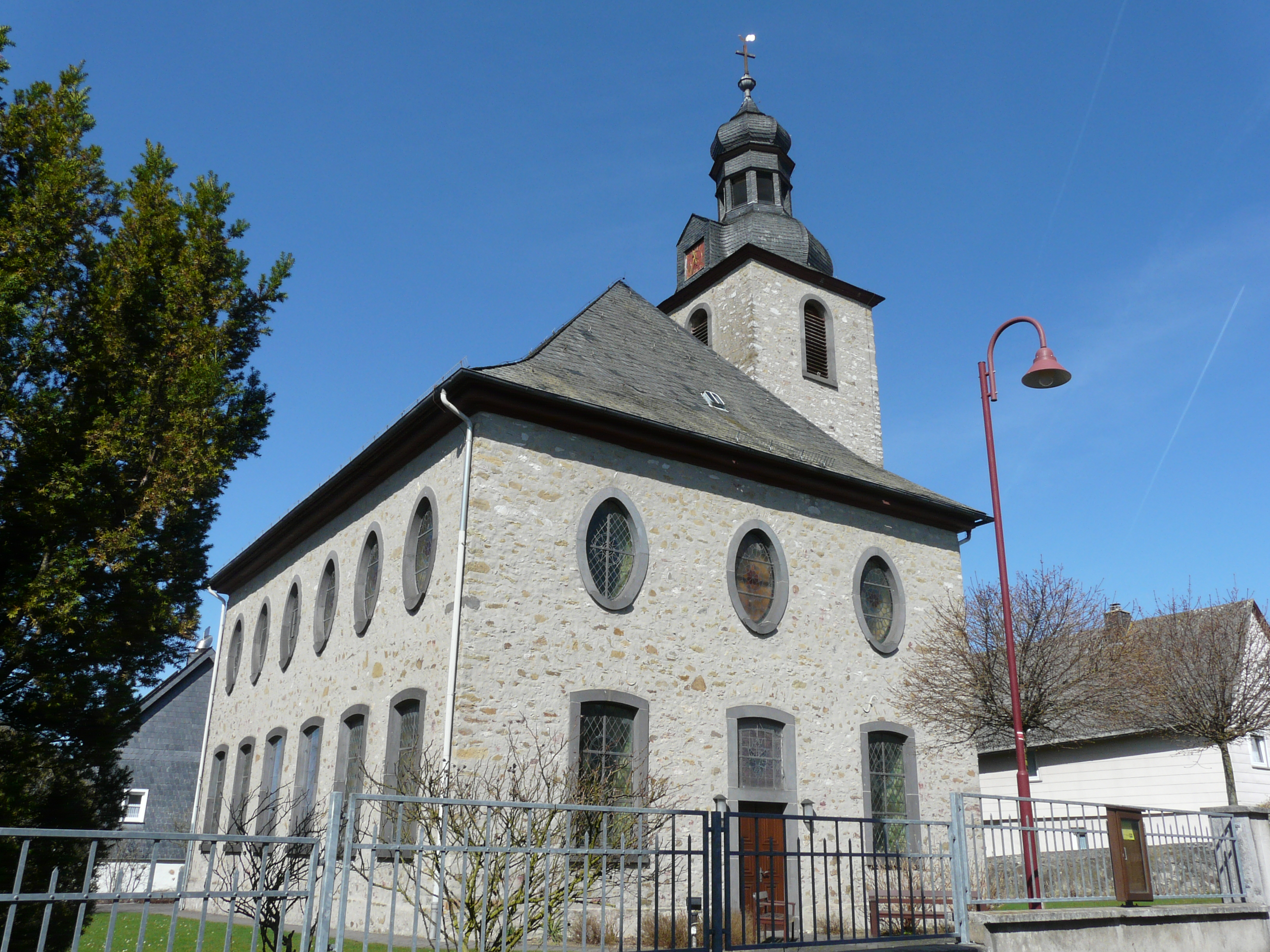 Evangelische Kirche in Schöffengrund-Schwalbach, Turmstraße 1